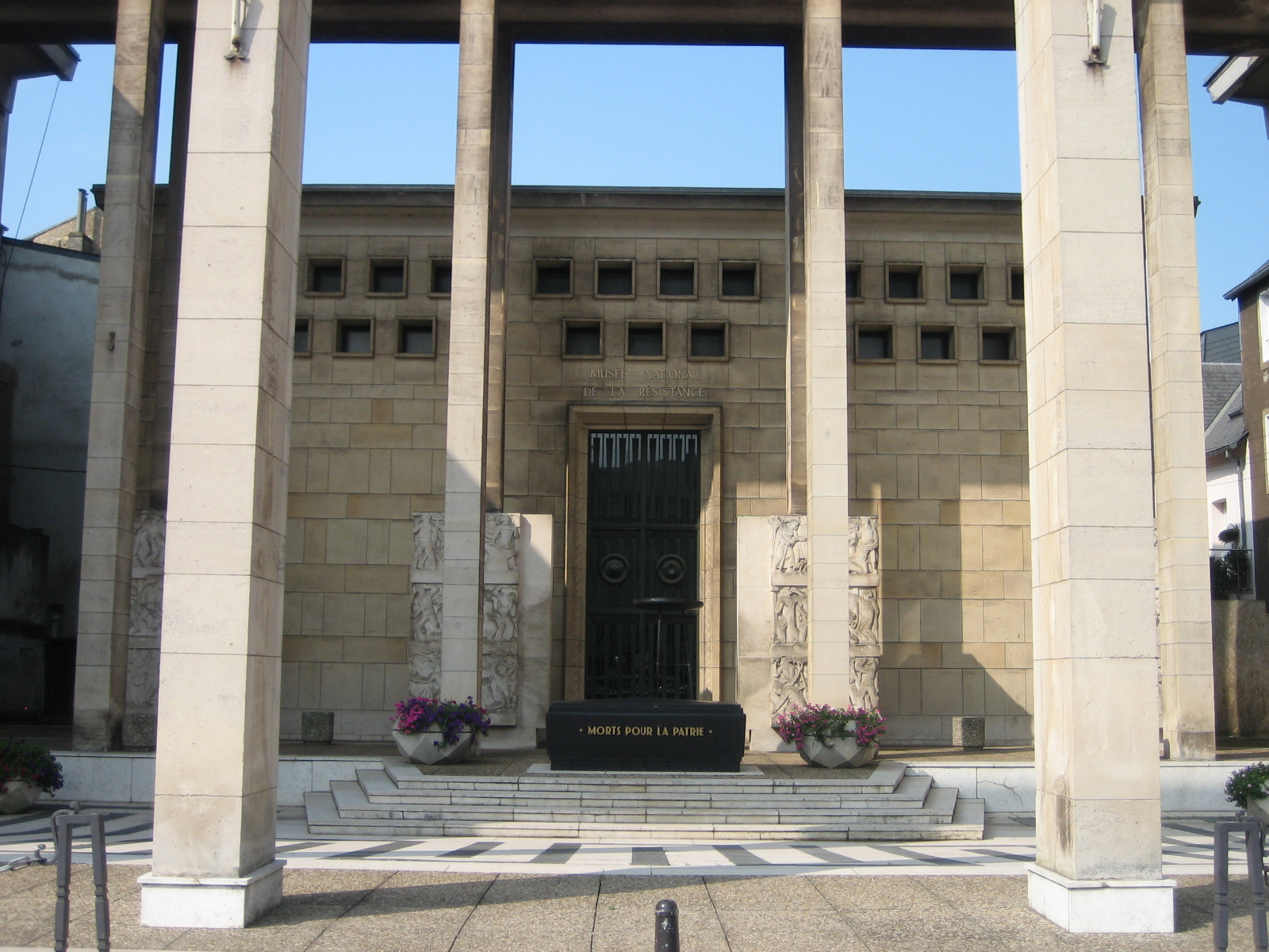 Den Nationale Resistenzmusée zu Esch-Uelzecht, am August 2007.